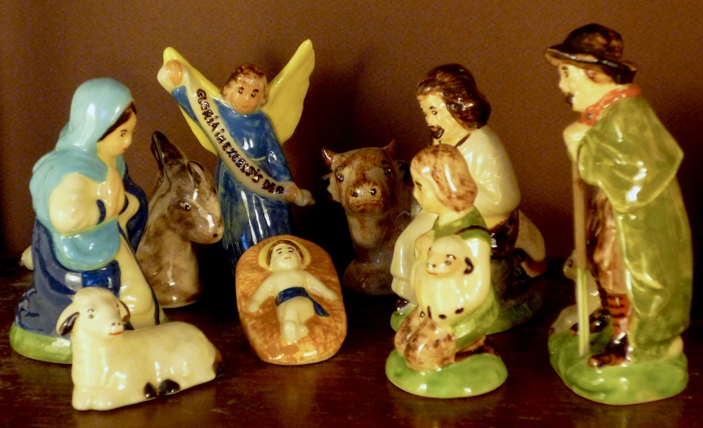 Crèche de Gérard Mosser potier à Soufflenheim Alsace Noël 2011